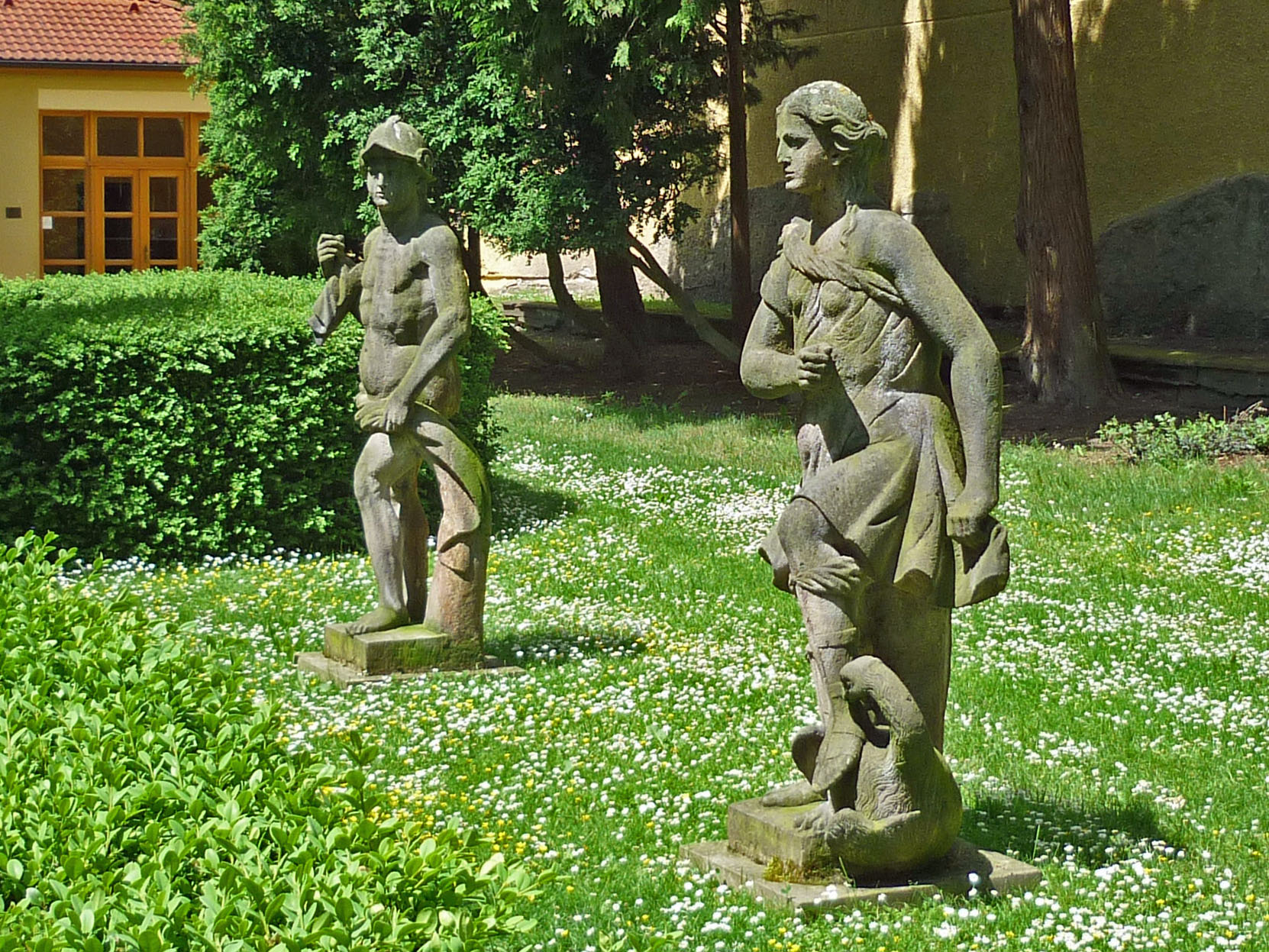 Schloss Rothenhaus bei Görkau in Nordböhmen (Červený Hrádek), zwei Skulpturen im Schlosspark